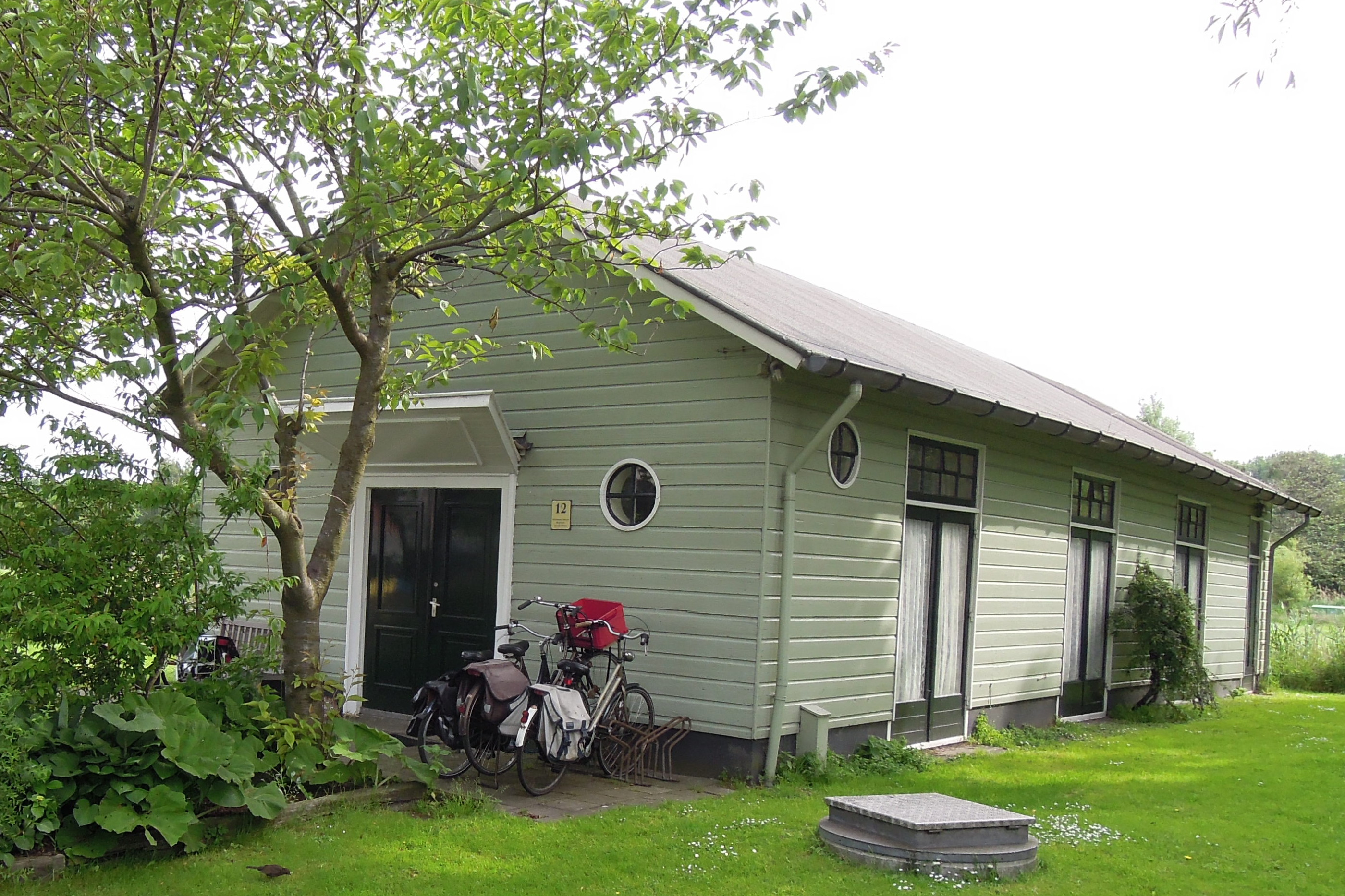 Dorpshuis uit tweede helft 19e eeuw, Wijkergouw 12, Schellingwoude, gemeente Amsterdam